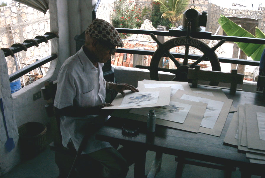 León Ricaurte en su estudio en La Libertad, Ecuador